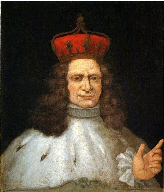 Ritratto del doge Stefano Lomellini